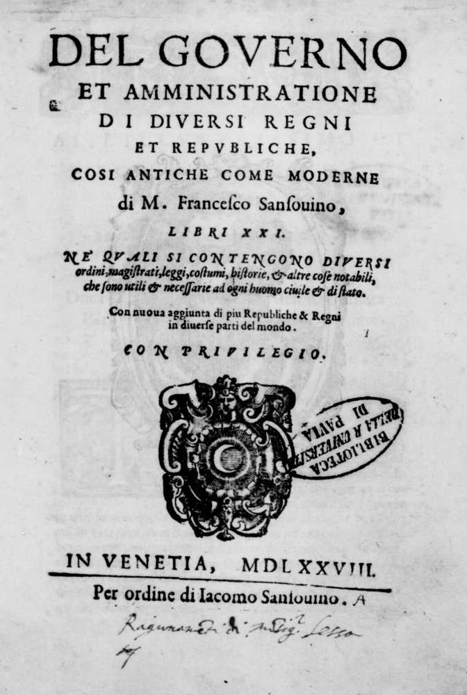 Frontespizio